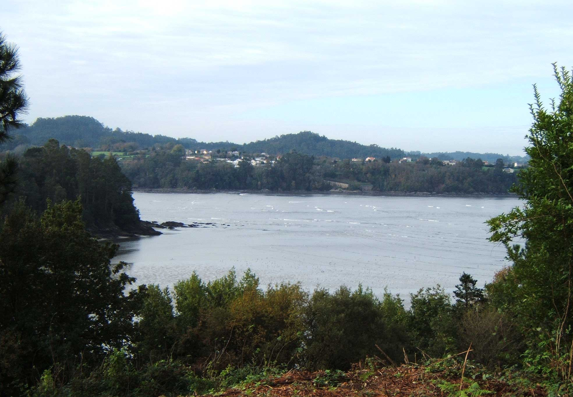 Ria de Betanzos, eigen werk december 2006